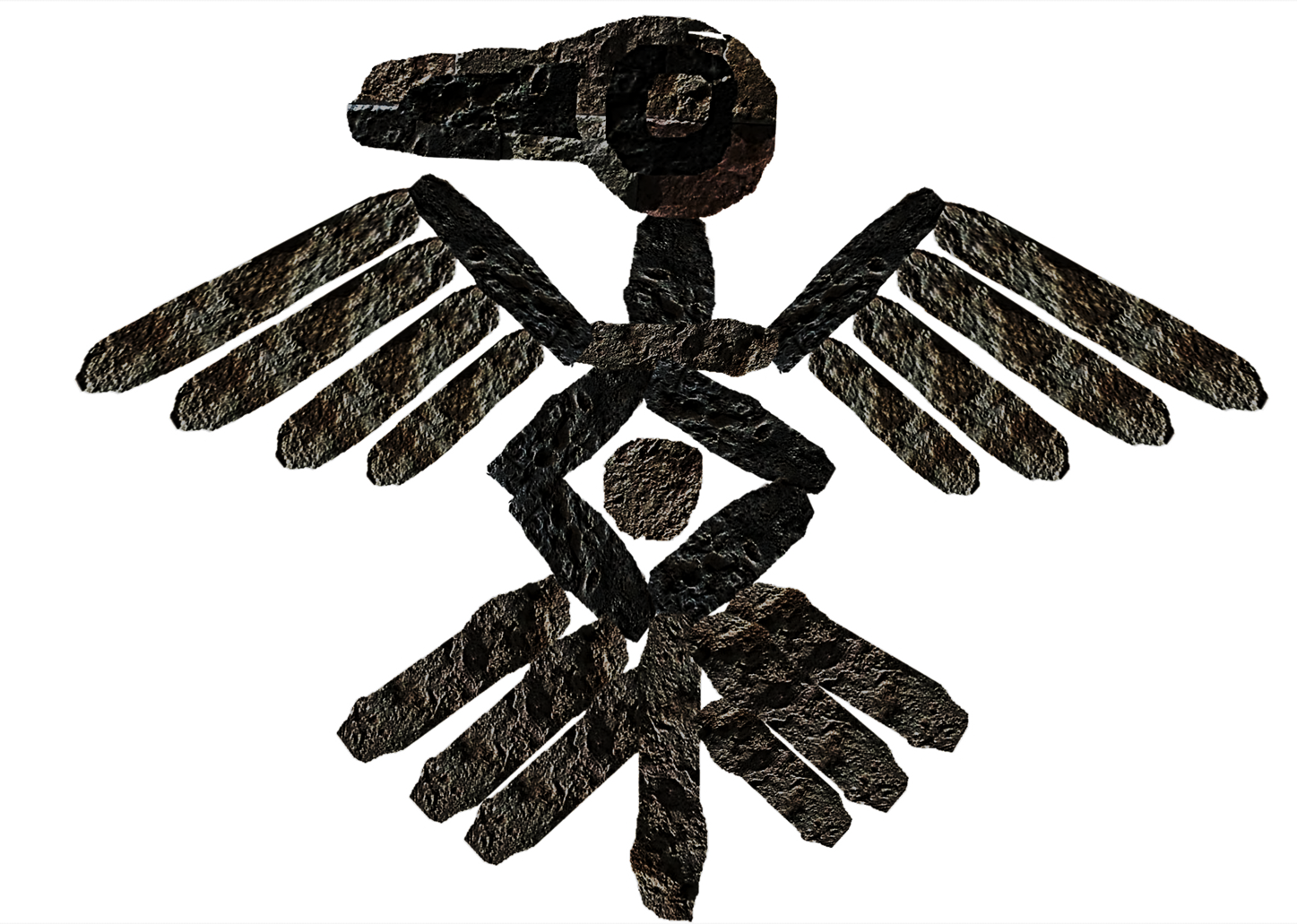 Juanjui